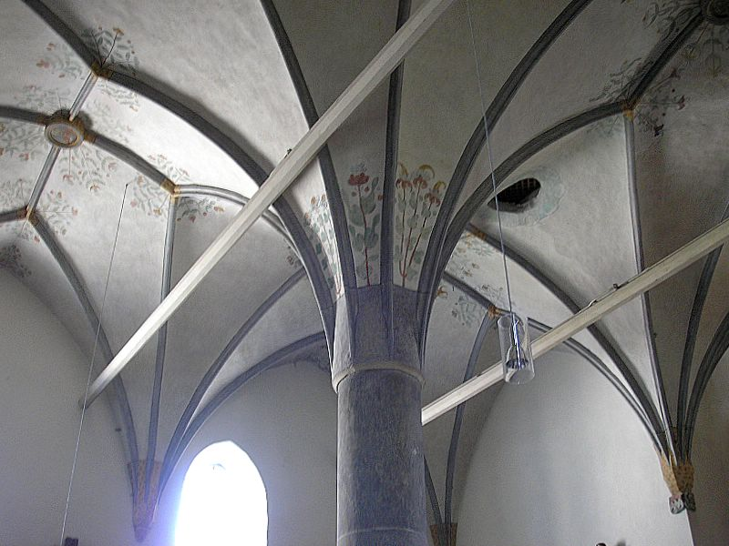 Alte Pfarrkirche St. Martin (Garmisch, Obb.). Das spätgotische Gewölbe des Langhauses, Juni 2006